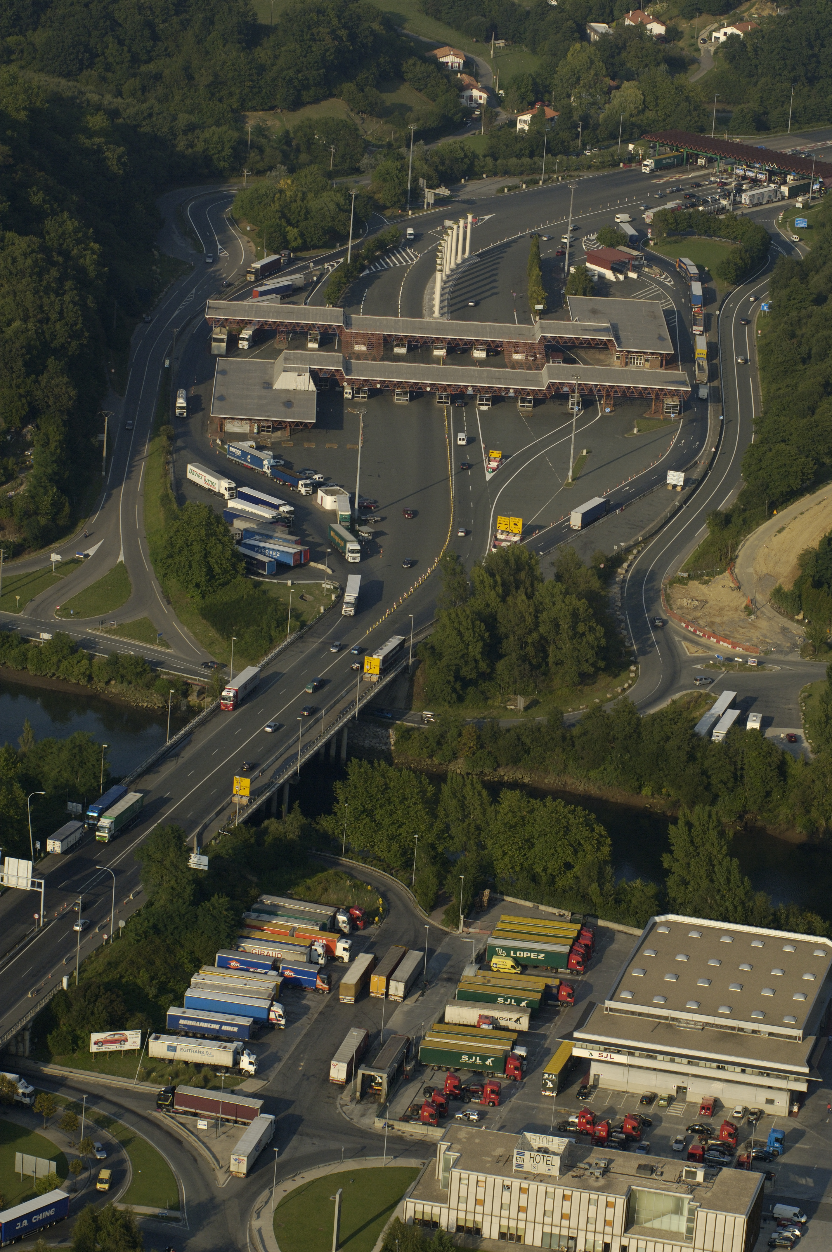 Antiguo control aduanero hispano-francés en Biriatou, sobre la A63. Hoy desaparecido. En el lugar de la aduana se encuentra el peaje de la autopista